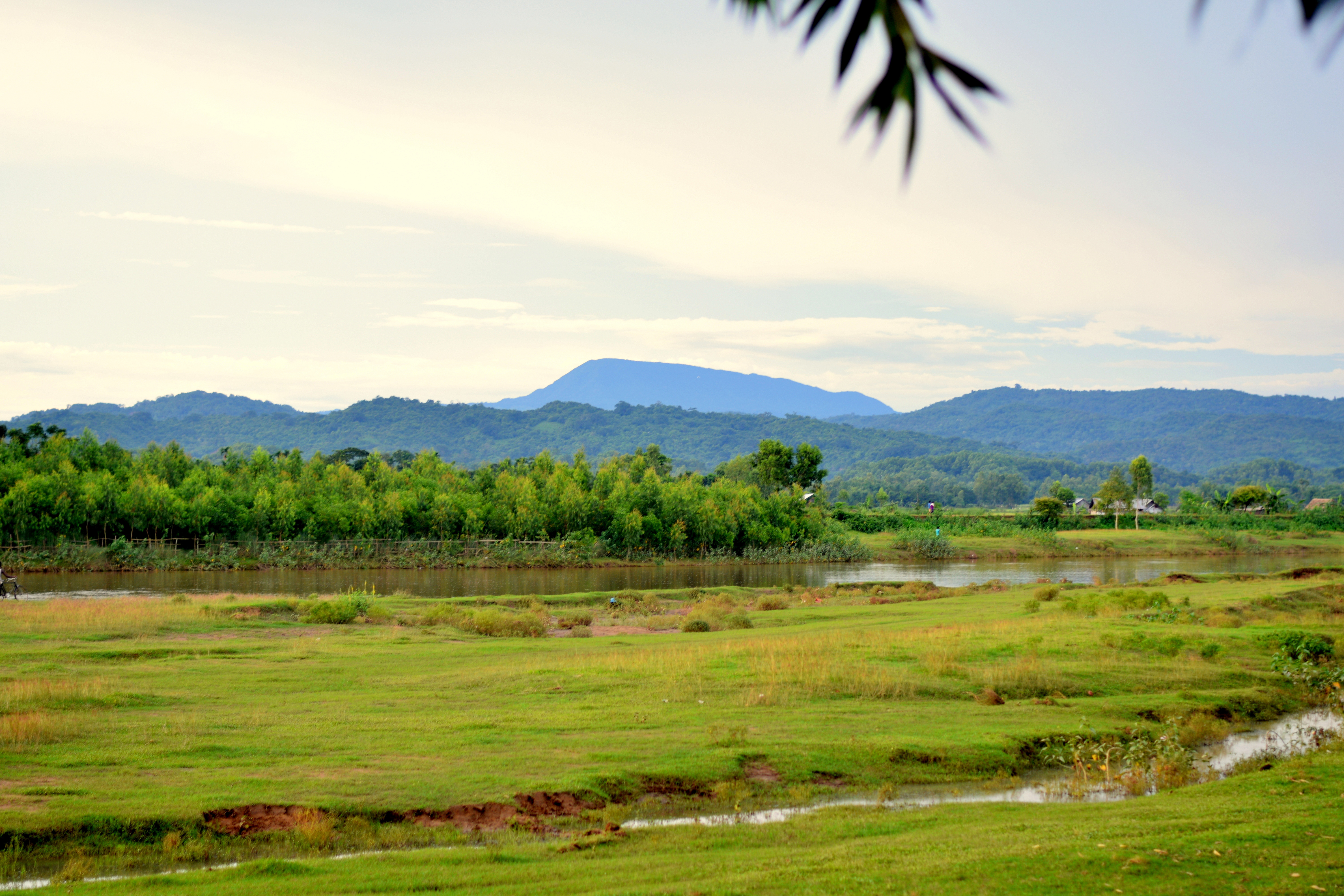 Durgapur Upazila, Netrokona